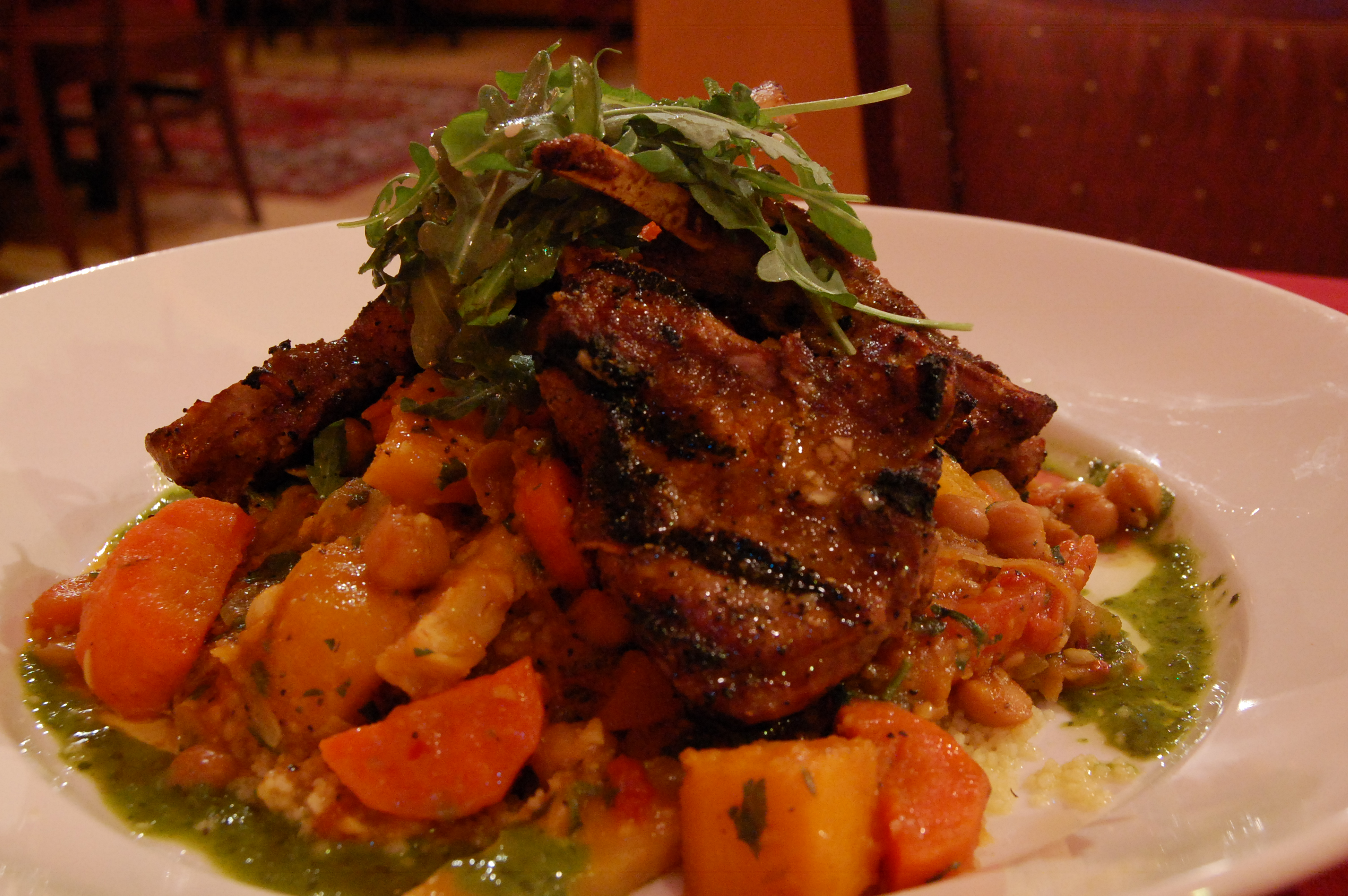 good